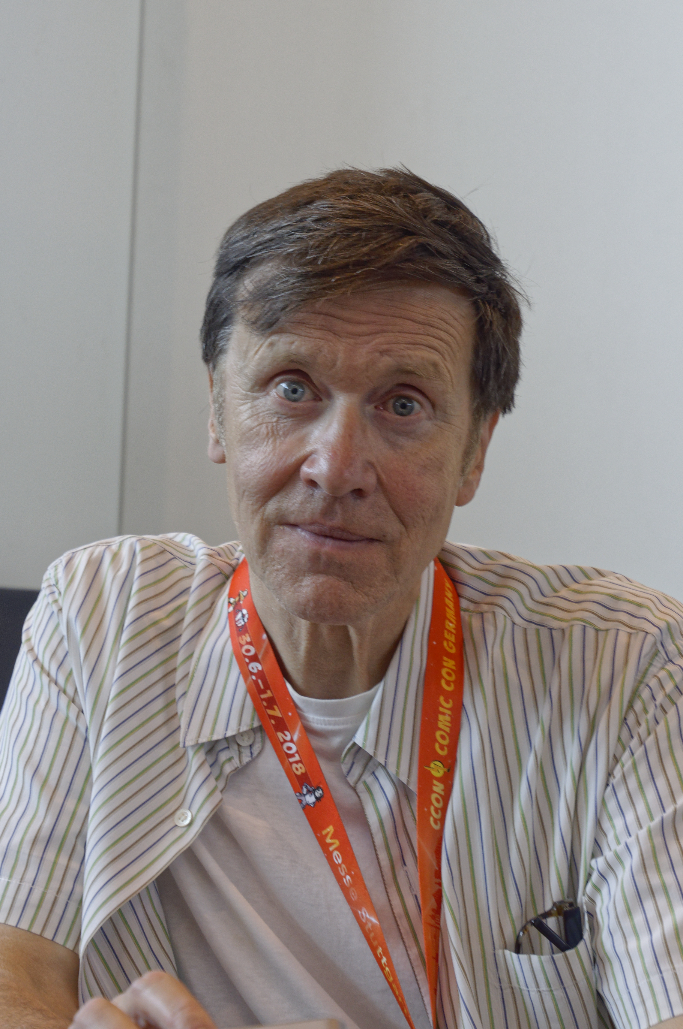 Bilder von der Comic Con Germany in Stuttgart 2018